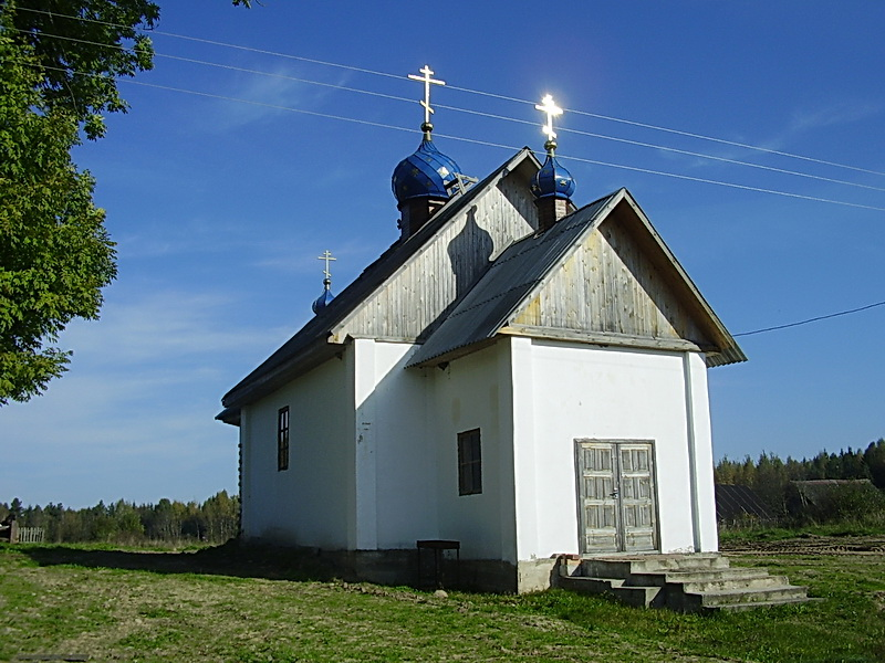 Гаравец. Царква